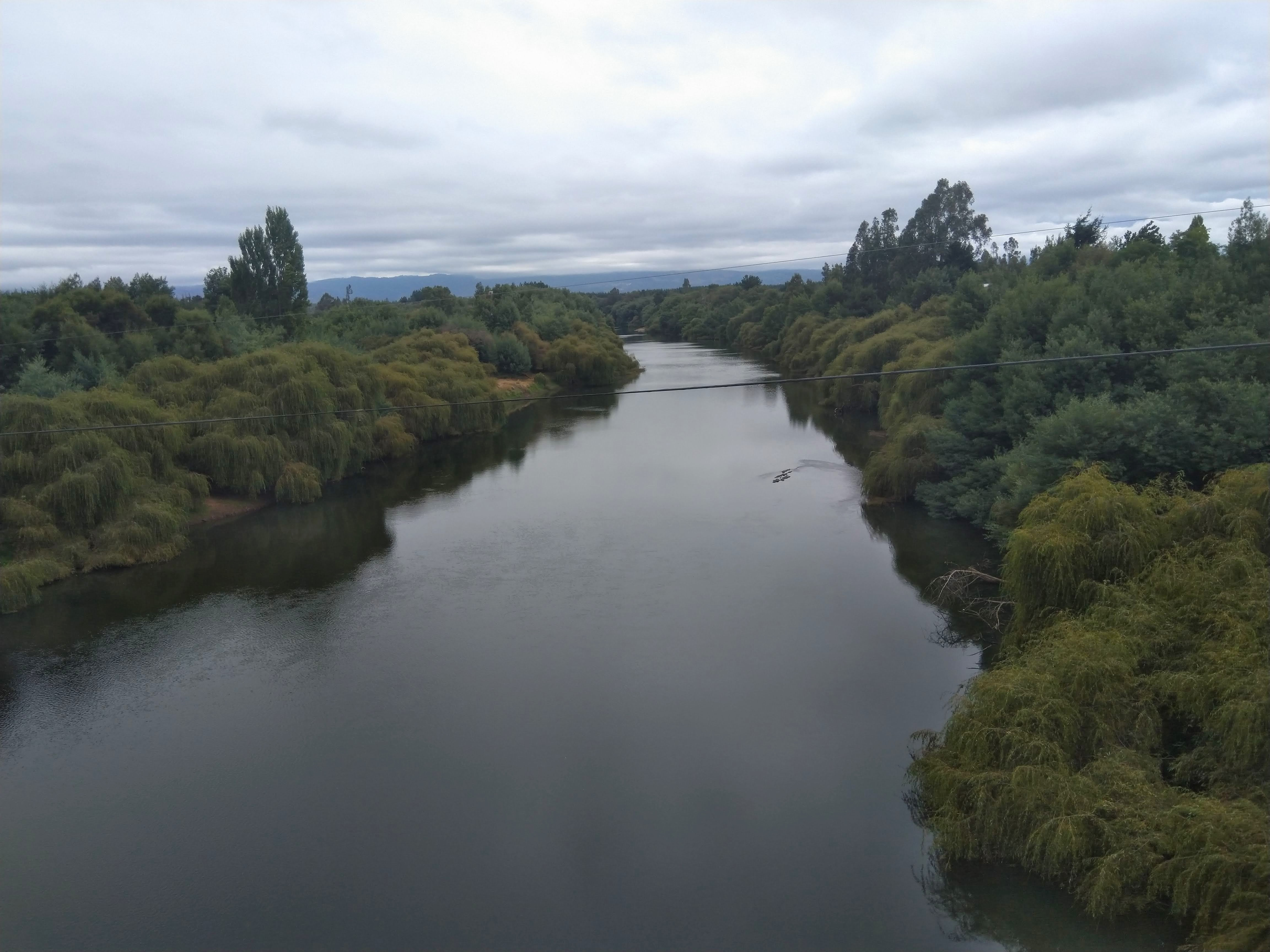 Río CholChol desde el Puente Chol Chol. Cholchol, Región de la Araucanía, Chile.